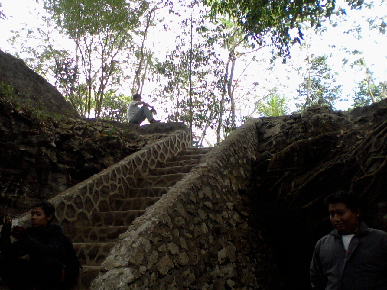 Tangga Gua Rancang Kencono